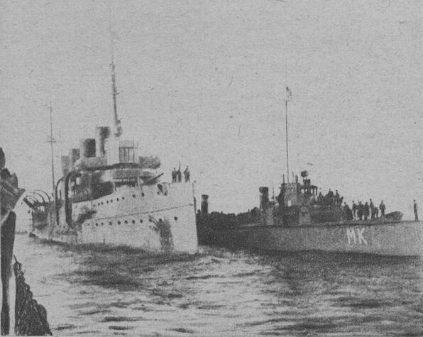 Le croiseur cuirassé Châteaurenault,touché par une torpille, ses hommes sont pris en charge par le Lansquenet, le Mamluck et le Spahi. Ici le transbordement des hommes.